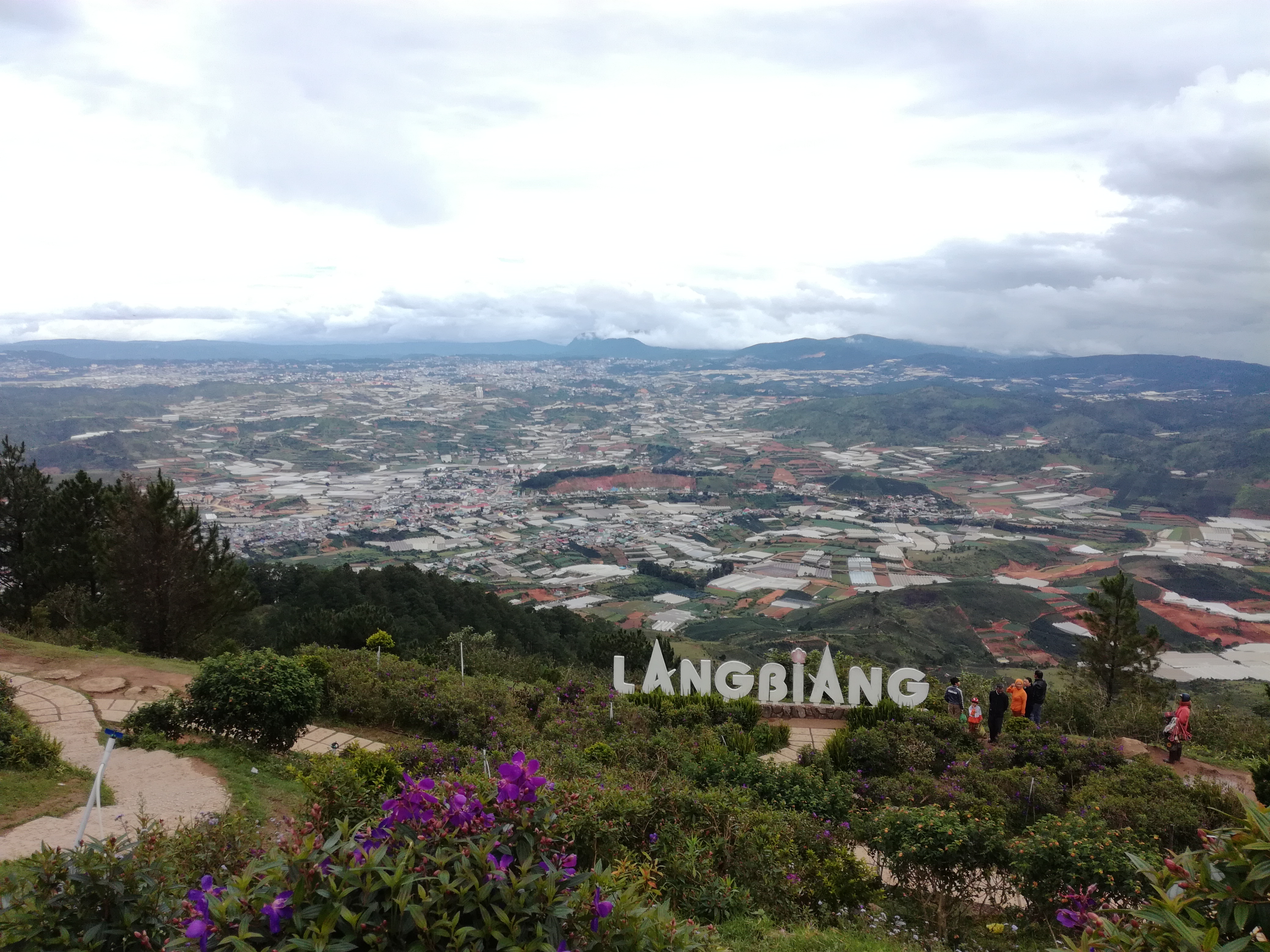 Langbiang Mountain (August 6, 2018)